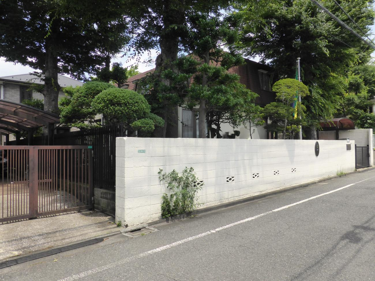 ガボン大使館全景